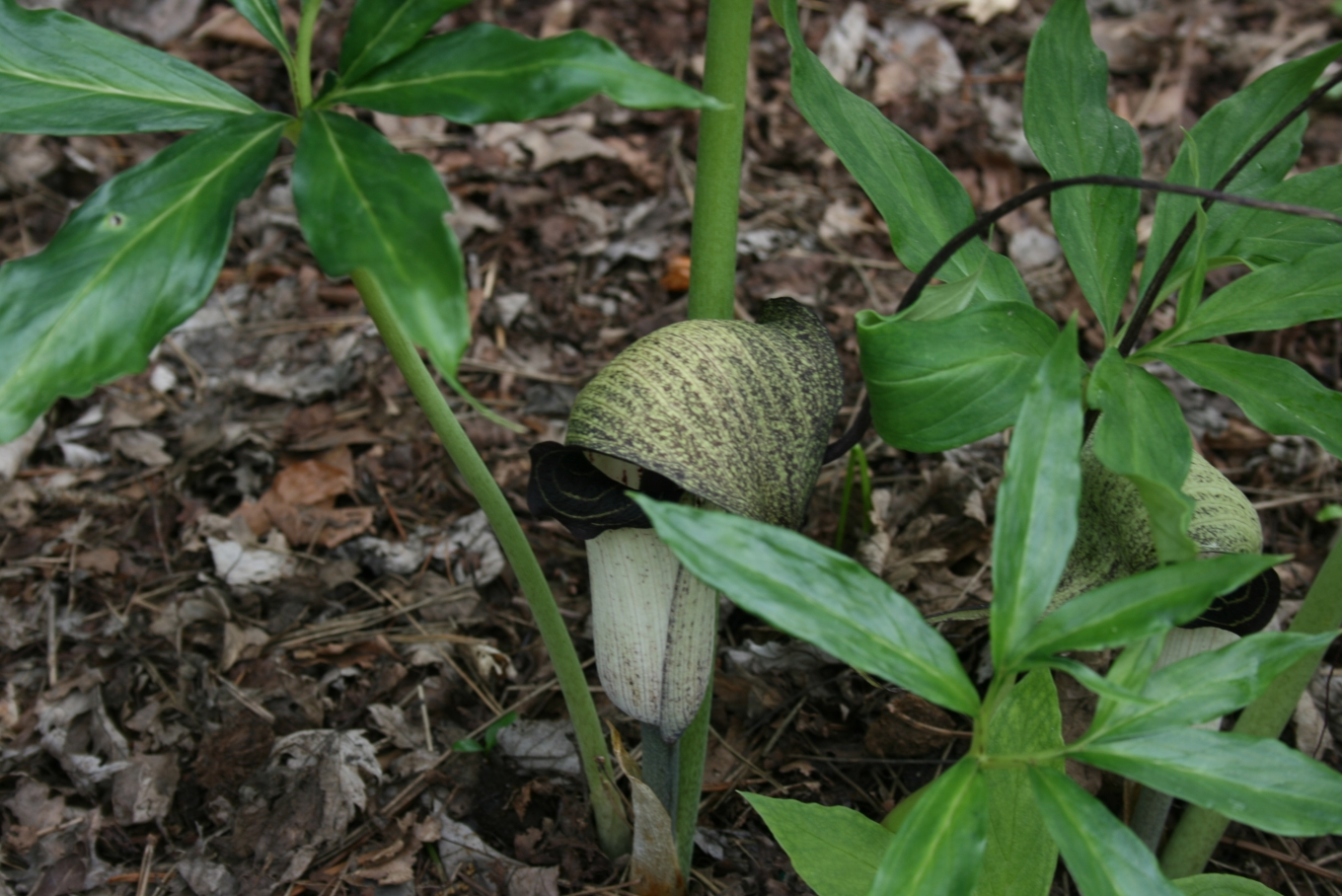 Arisaema uvashima: Habit